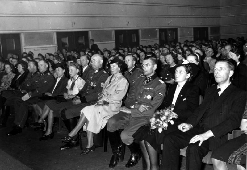 Rundfunkhaus 3. v. l. Fegelein, Mitte Giese [B. Griese], Major Pannier